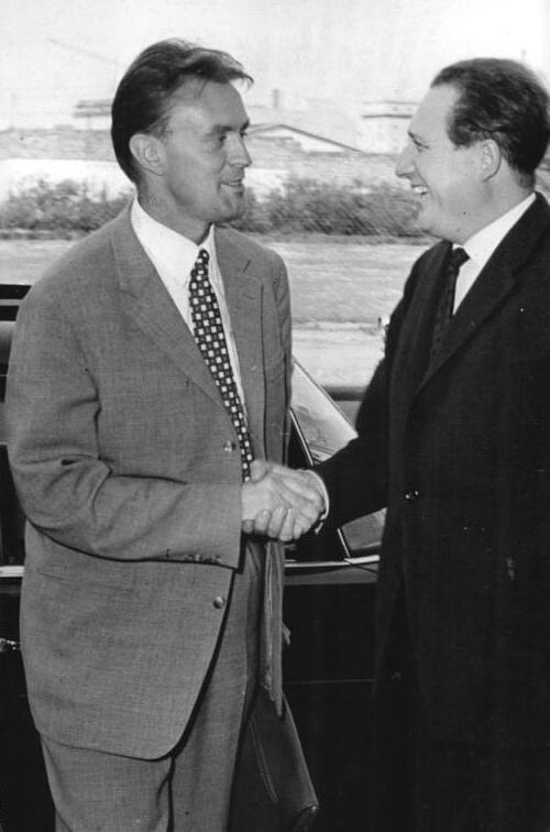 Zentralbild Spremberg -26.8.1964 Verhandlungen über Weiterführung der Passierscheinübereinkommen fortgesetzt Der Vertreter der Regierung der DDR, Staatssekretär Erich Wendt und der Vertreter des Senats von Westberlin, Senatsrat Horst Korber (auf unserem Bild links) trafen in Begleitung von Experten am 26. August 1964 zu weiteren Verhandlungen über eine Weiterführung der Passierscheinübereinkunft vom 17. Dezember 1963 zusammen. Unser Bild zeigt Senatsrat Horst Korber beim Eintreffen vor dem Haus der Ministerien in Berlin Leipziger Strasse zu den Verhandlungen.